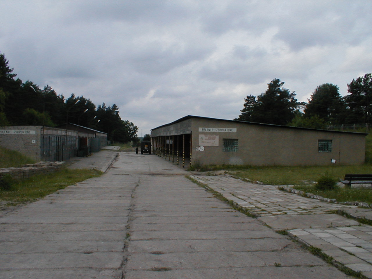 Park wozów bojowych na poligonie Centrum Szkolenia Czołgowo-Samochodowego w Pile stan na 10.06.2002 r. przed likwidacją Centrum